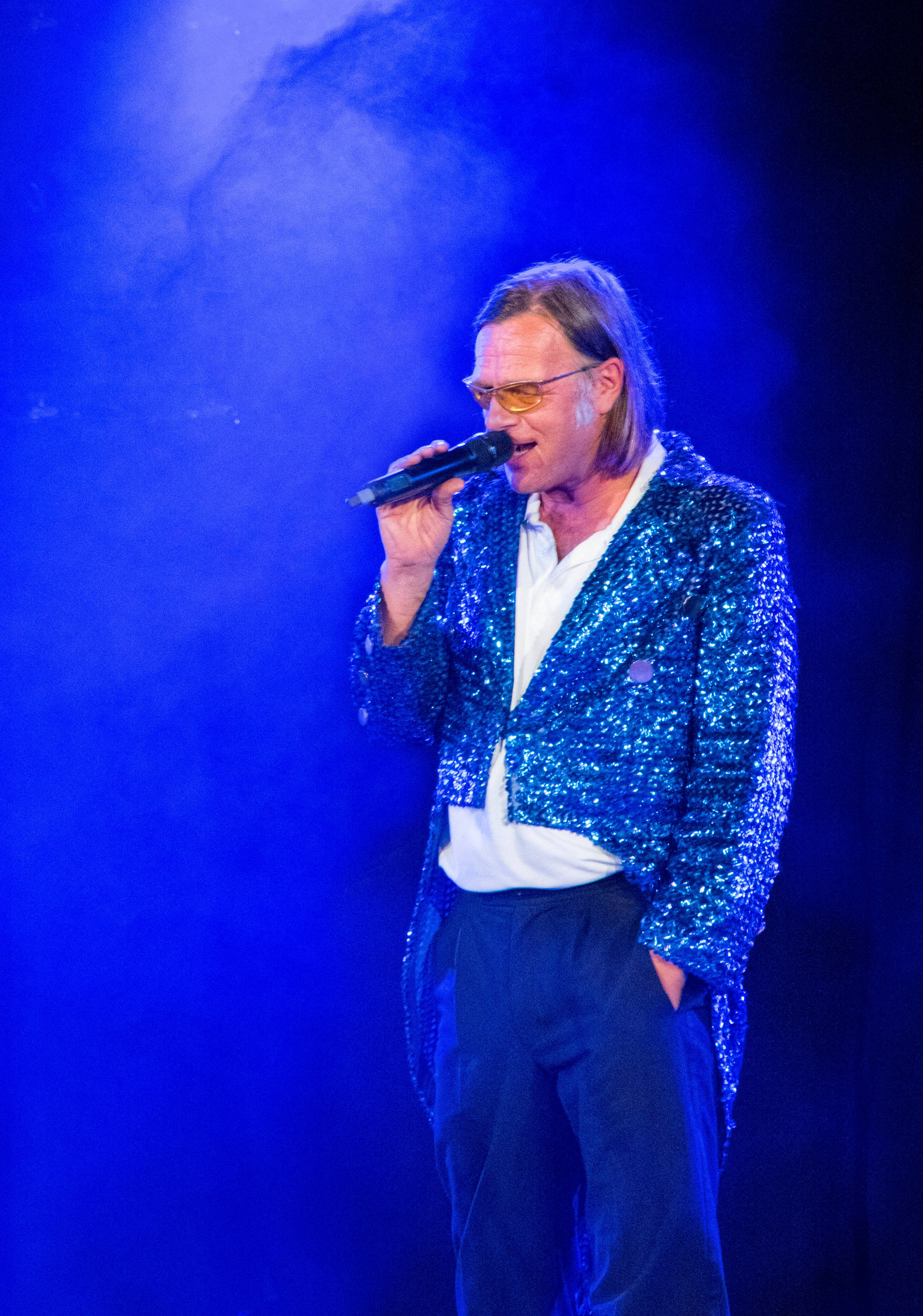 Bilder vom ZMF 2015 Die kleine Tierschau